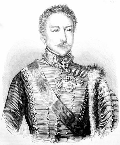 Vécsey Ágoston (1775–1857) császári és királyi lovassági tábornok portréja